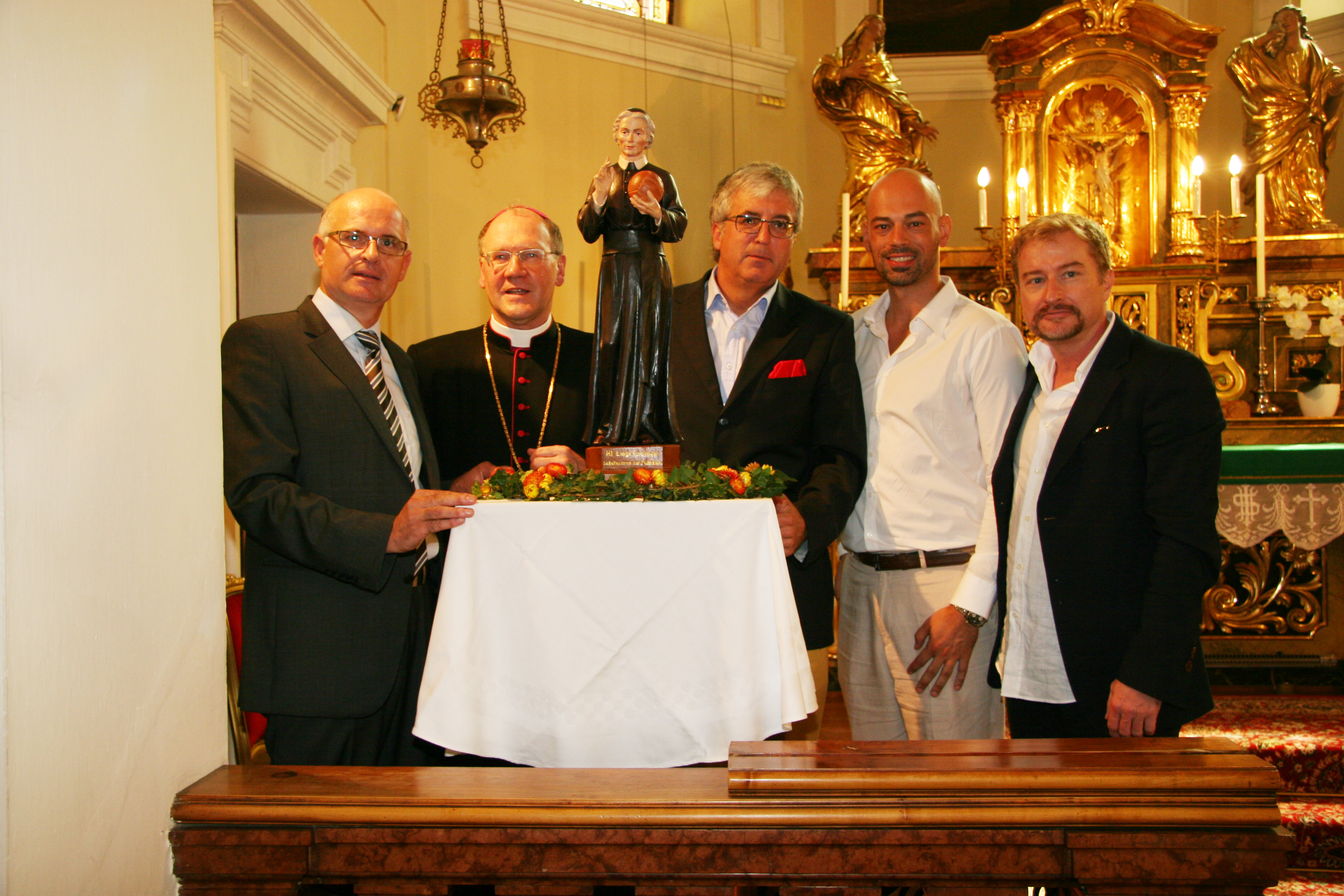 Offizielle Einweihungszeremonie dr. Bischof Dr. Alois Schwarz. Bild mit Initiator Manfred Pesek. MMag. Dr. Walter Walzl, Mag. Robert Hofferer, Filip Stuflesser u. Bischof Dr. Alois Schwarz